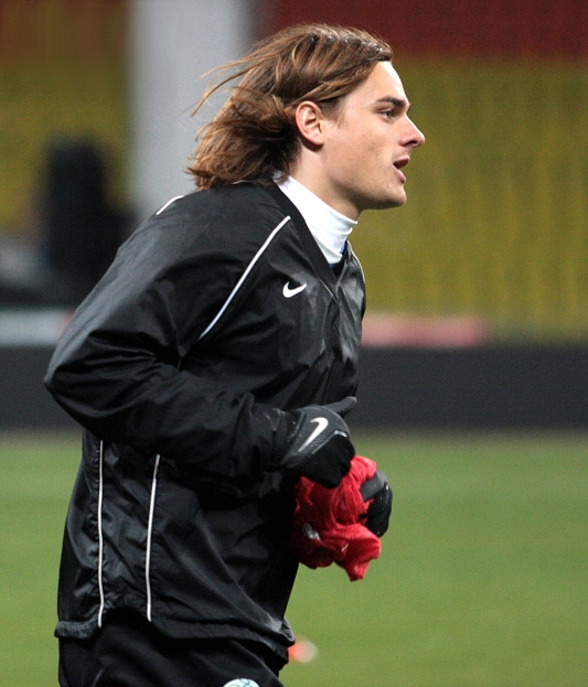 Nejc Pečnik